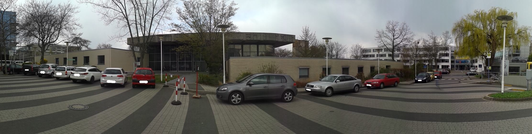 Baudenkmal Am Fort Gonsenheim 151 Mainz